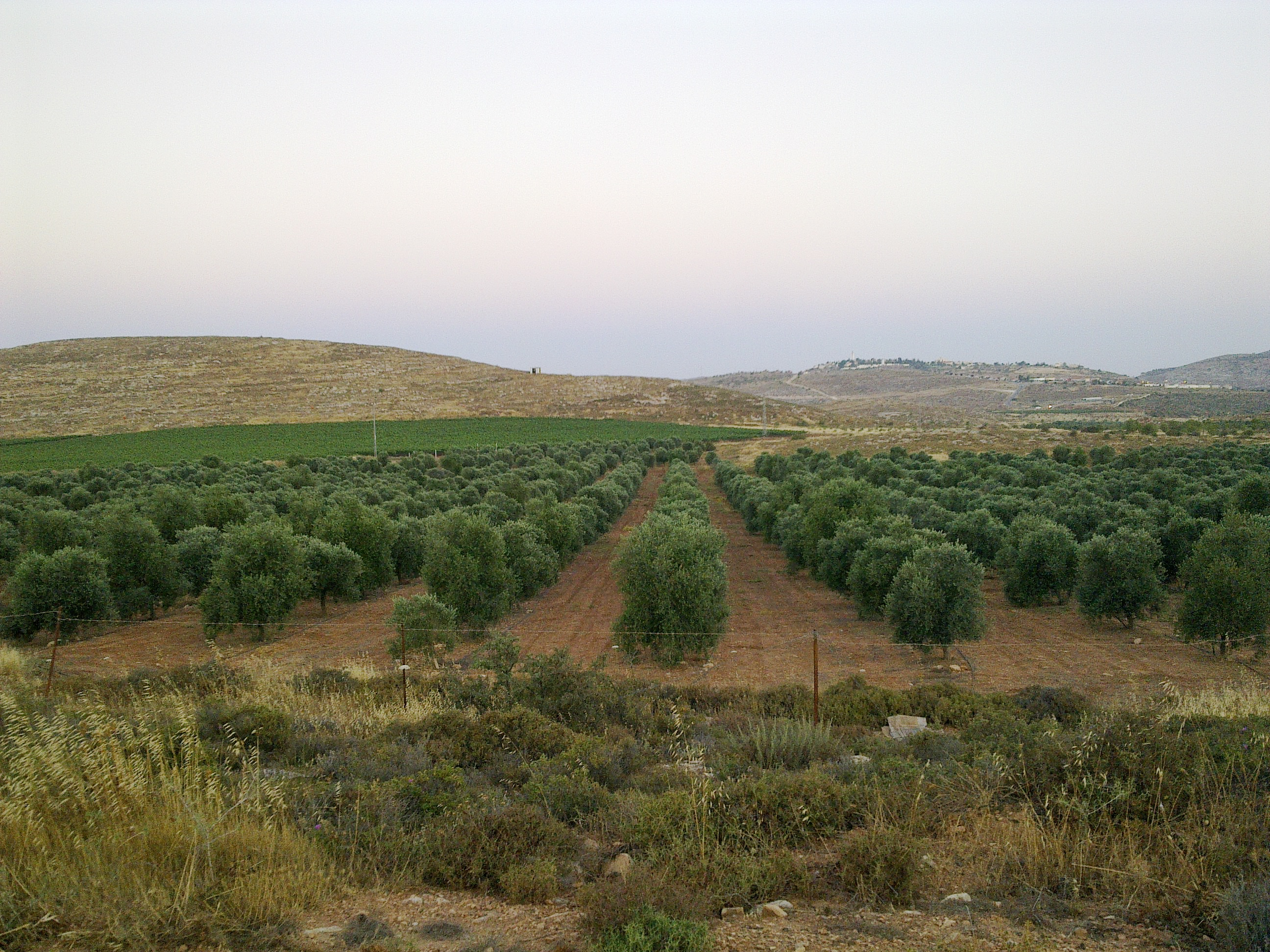 עצי זית השייכים למשק אחיה